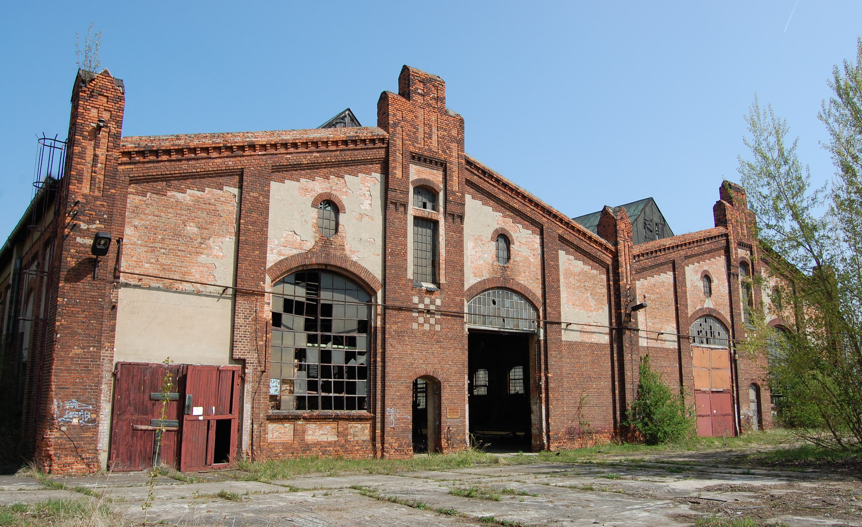 ehemalige Weichenbauanstalt im RAW Magdeburg-Salbke, Westseite